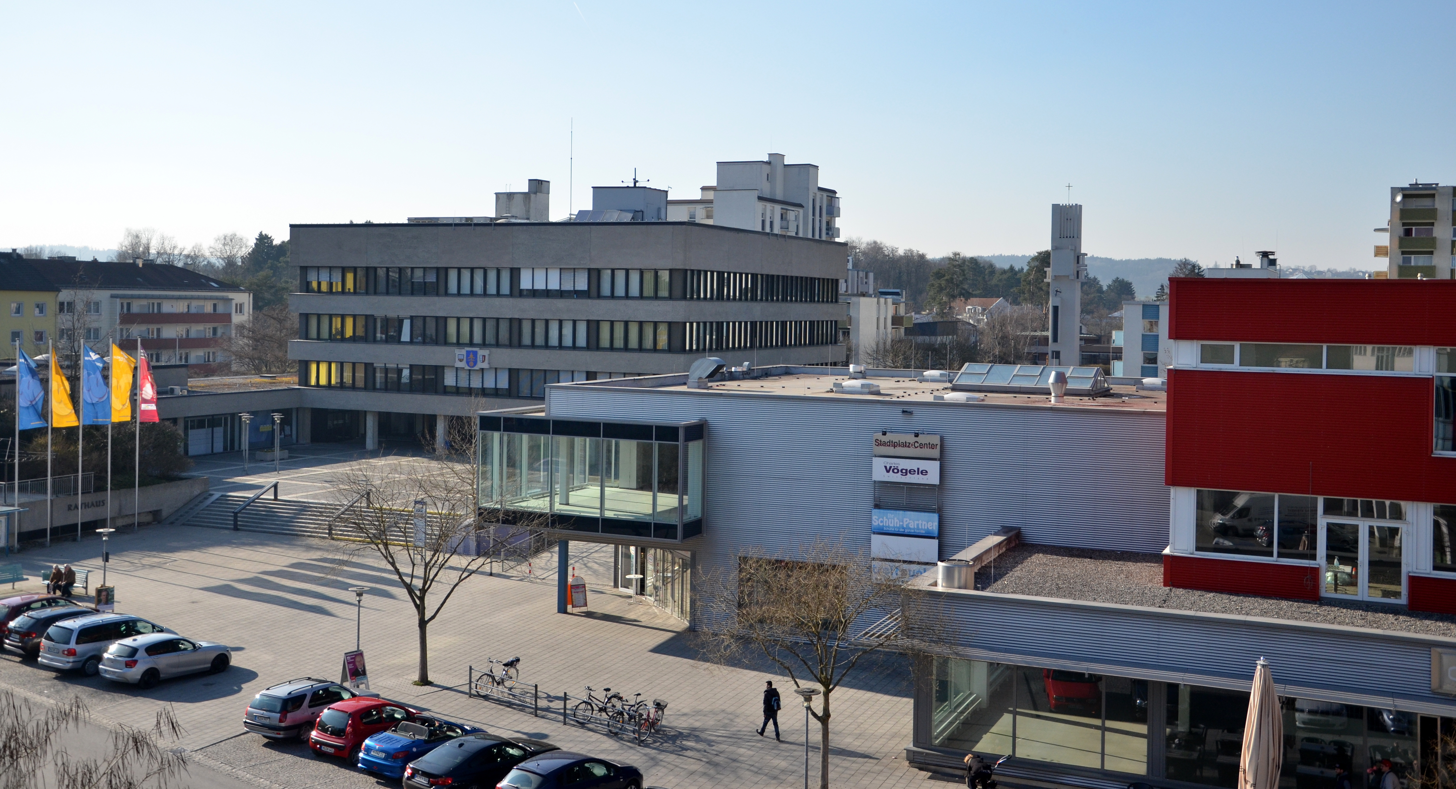 Waldkraiburg Rathaus mit Glockenturm